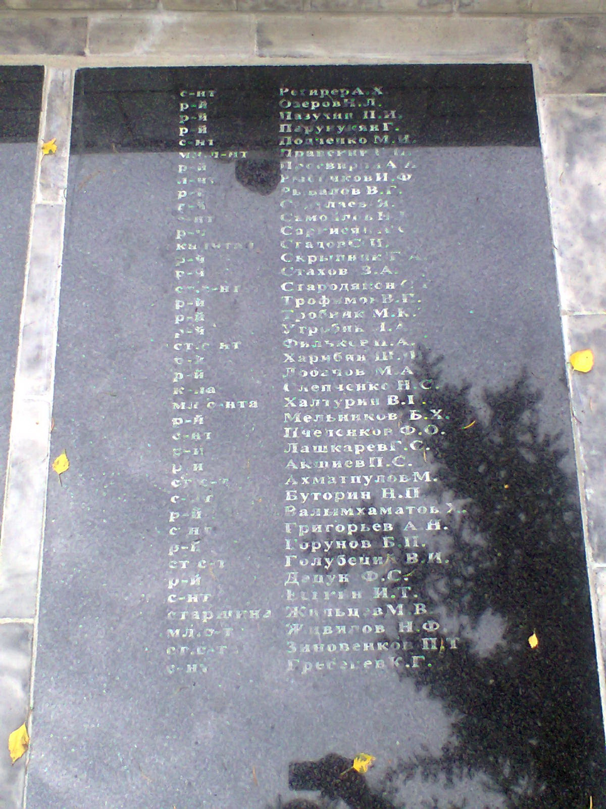 плита мемориала №2. Высочиновка (Пролетарское) Змиёвского района Харьковской области.